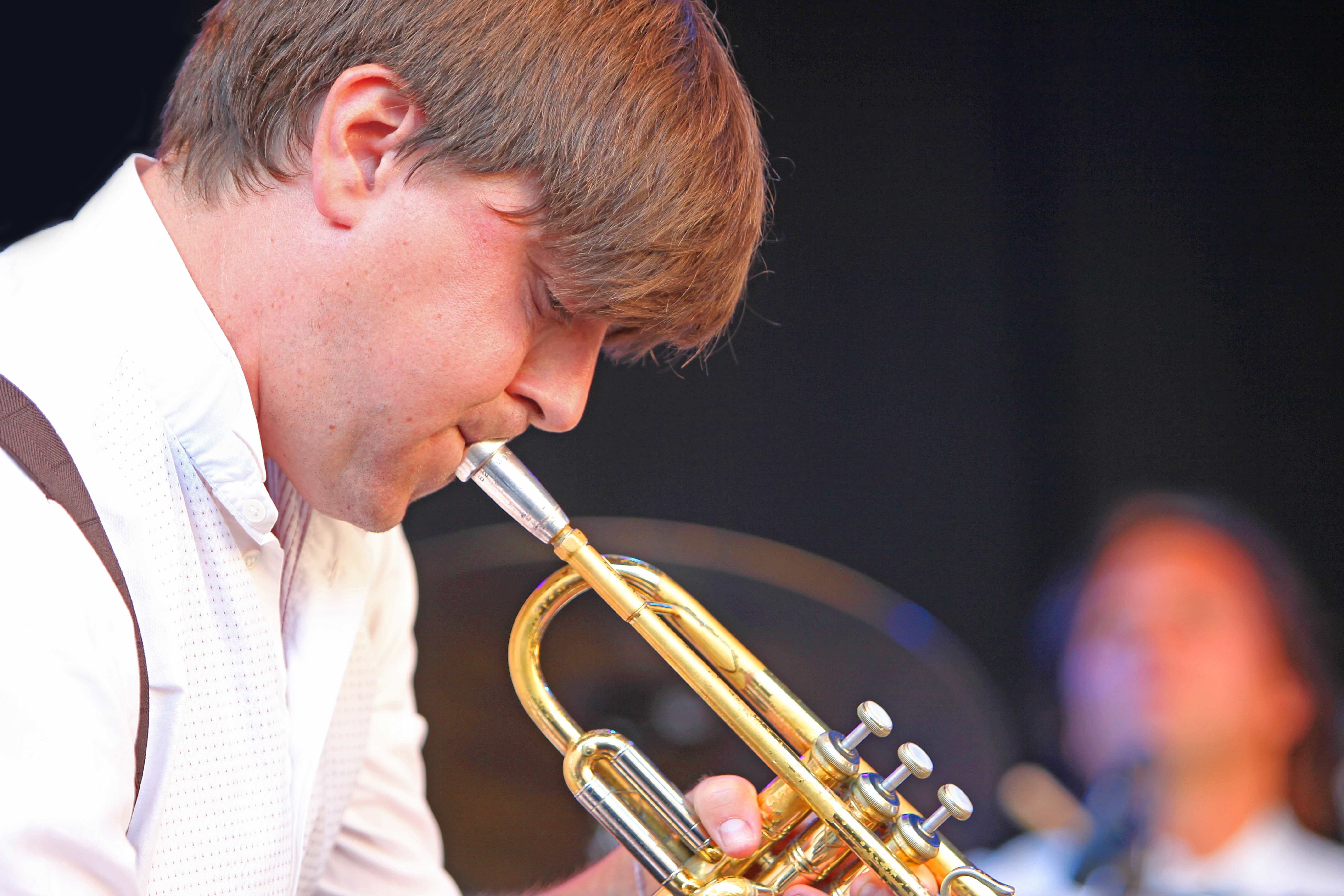 Goran Kajfes at Stockholm Jazz Festival 2009